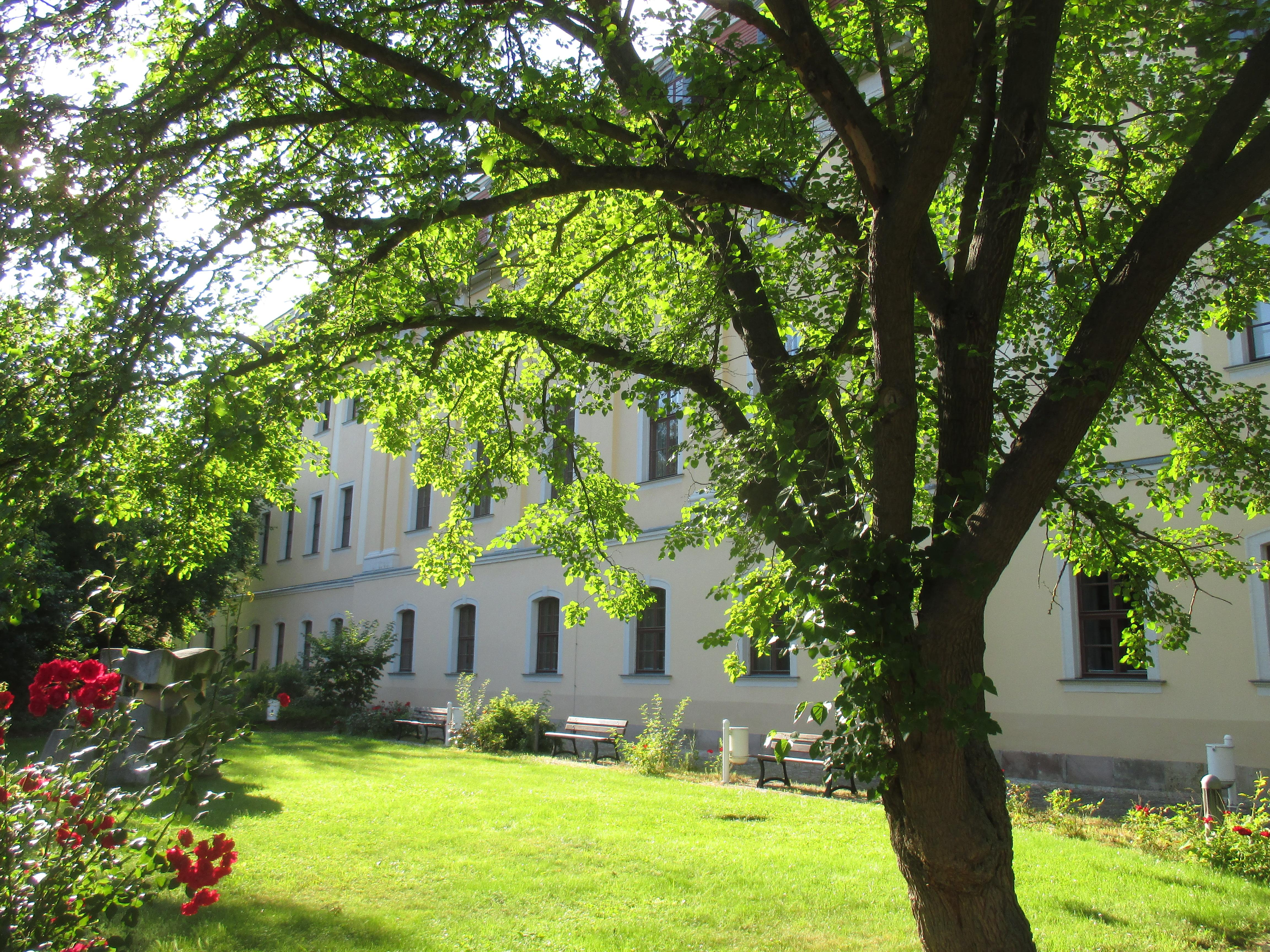 Schwarze Maulbeere, Baum vor dem Haus der Charlotte von Stein in Weimar.